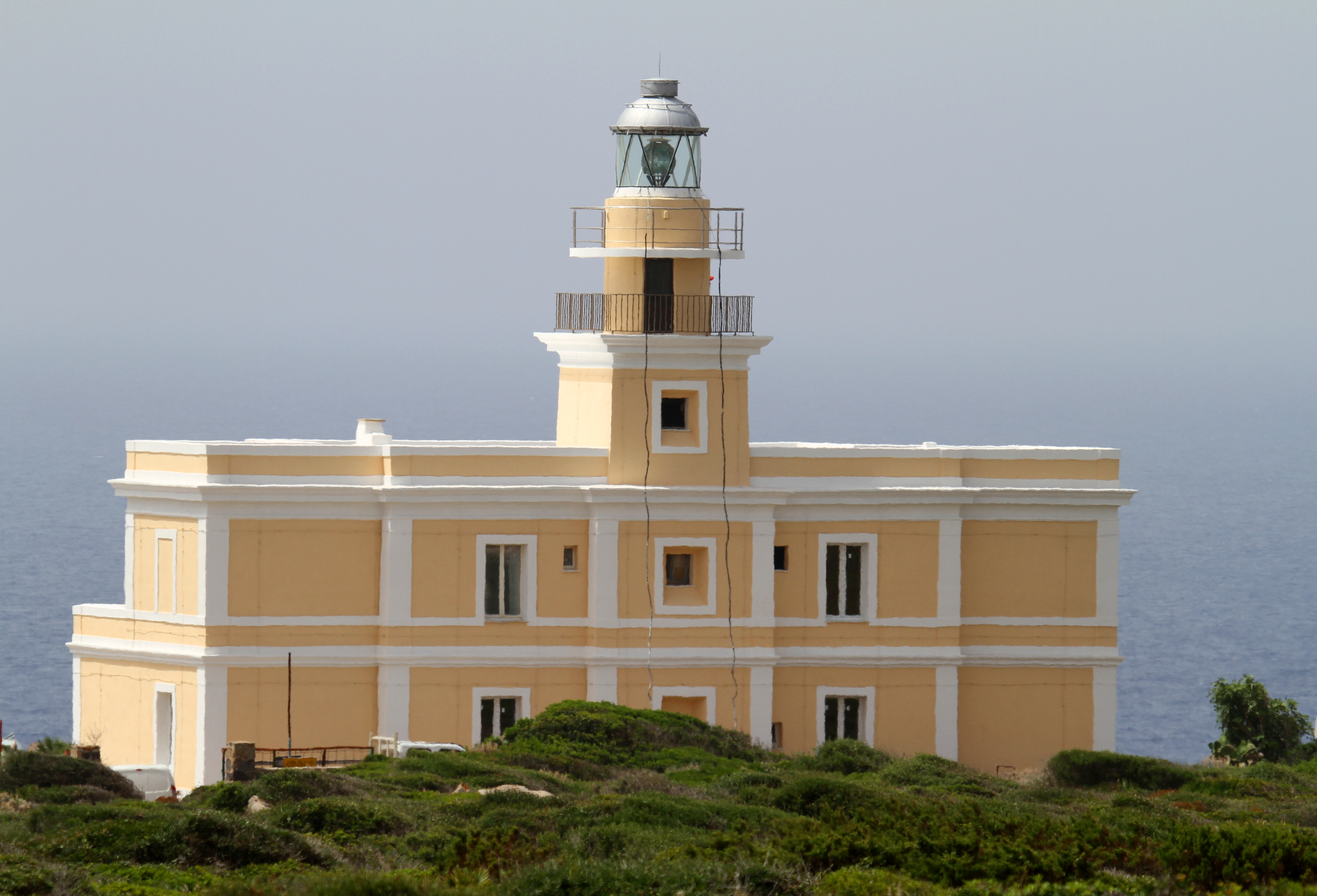 Faro di Capo San Marco